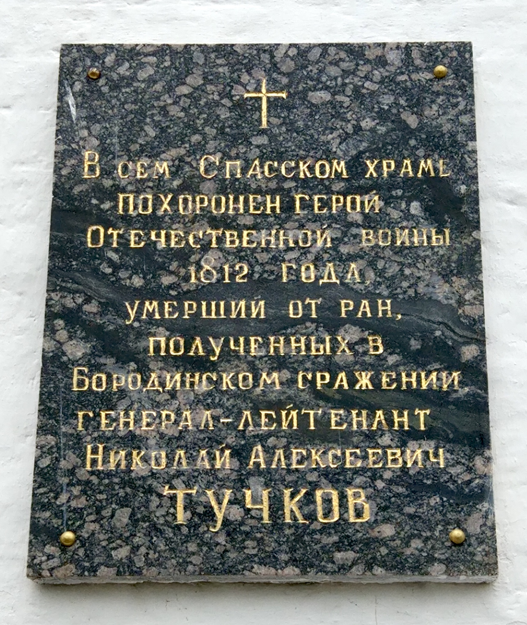 Мемориальная доска генерала Н. А. Тучкова на стене Спасского храма Толгского монастыря.